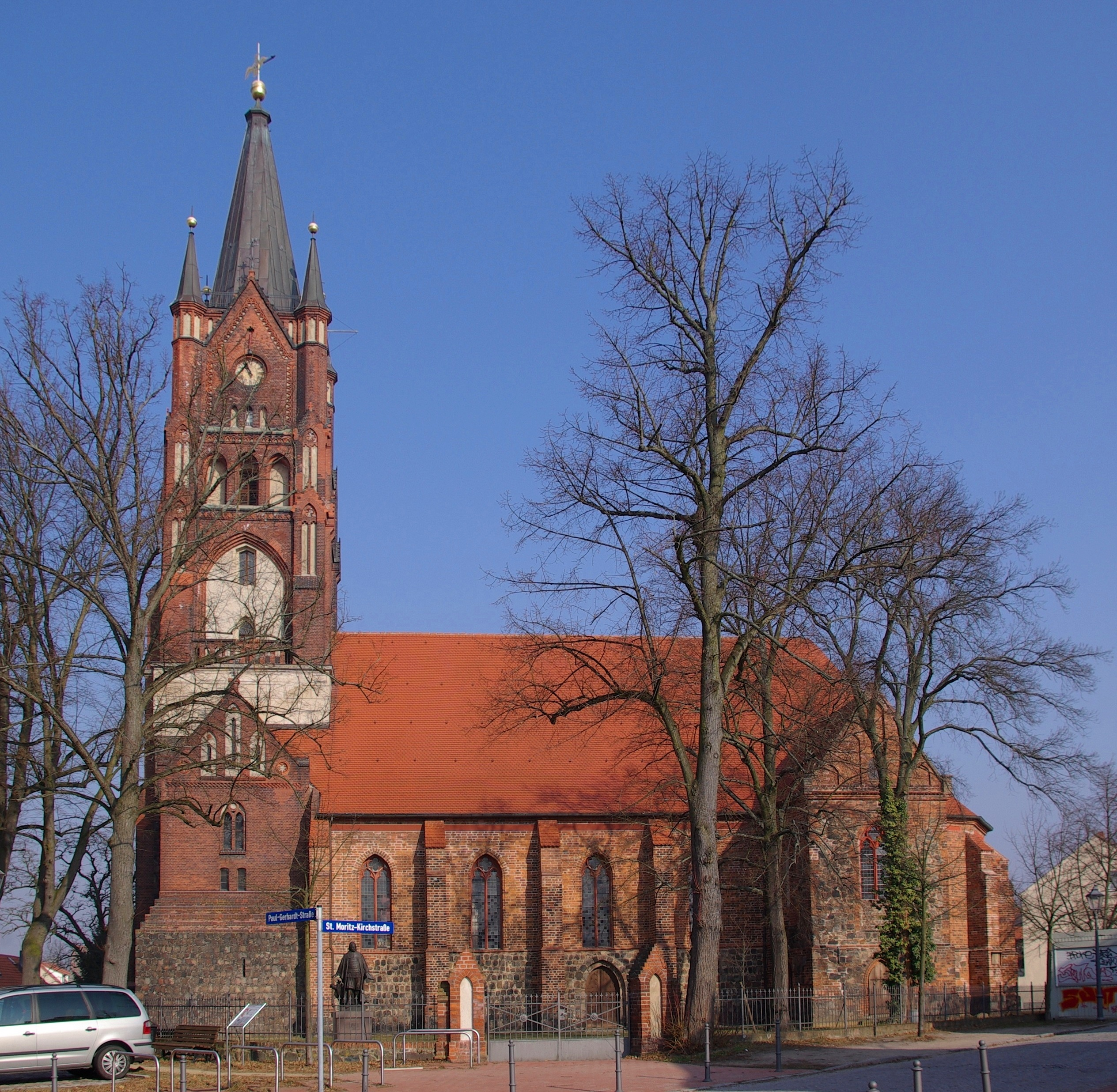 Mittenwalde, evang. Kirche St. Moritz